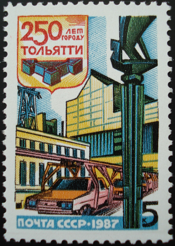 Почтовая марка СССР - 250-летие Тольятти